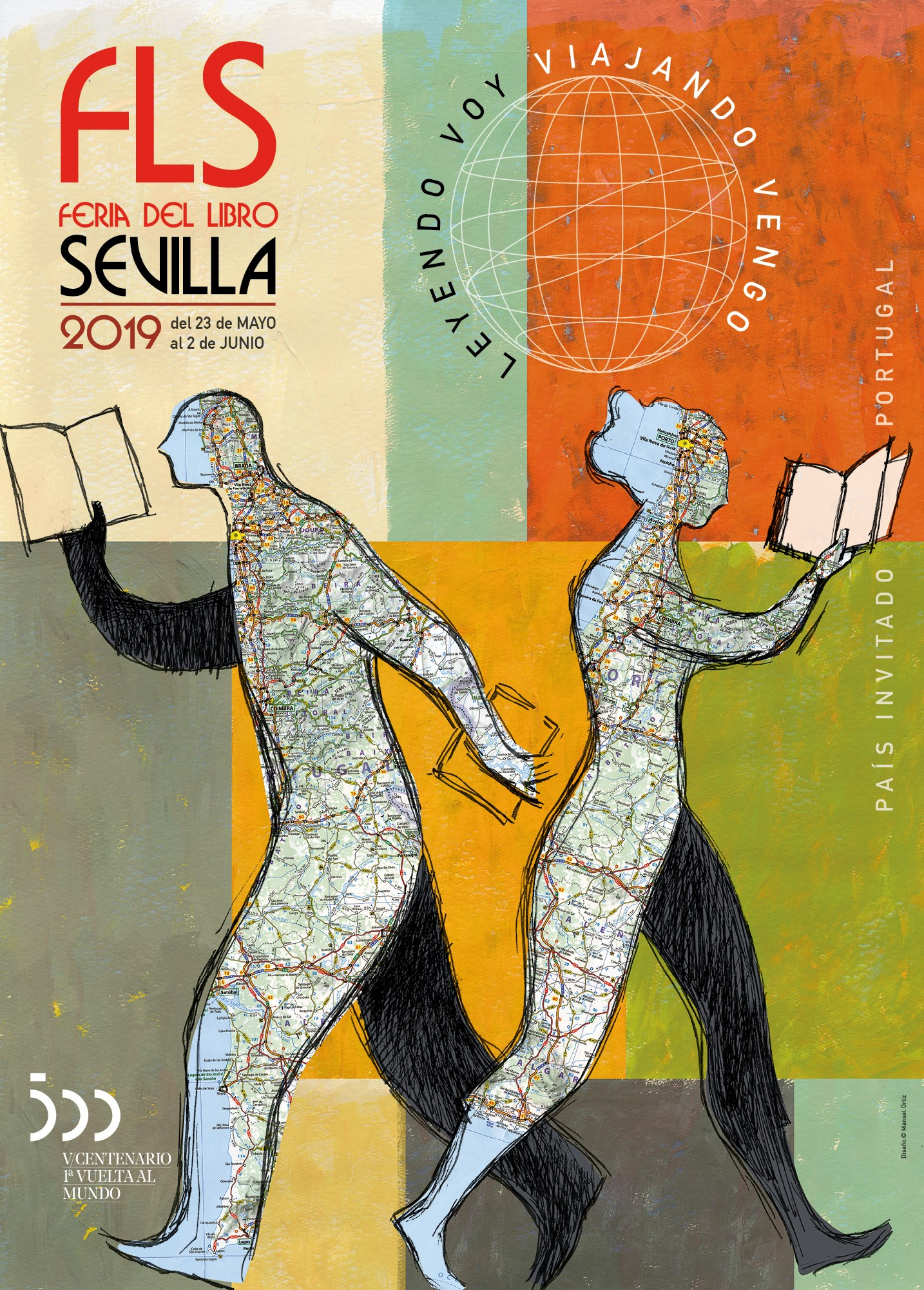 Fotografía del cartel anunciador de la Feria del Libro de Sevilla de 2019.